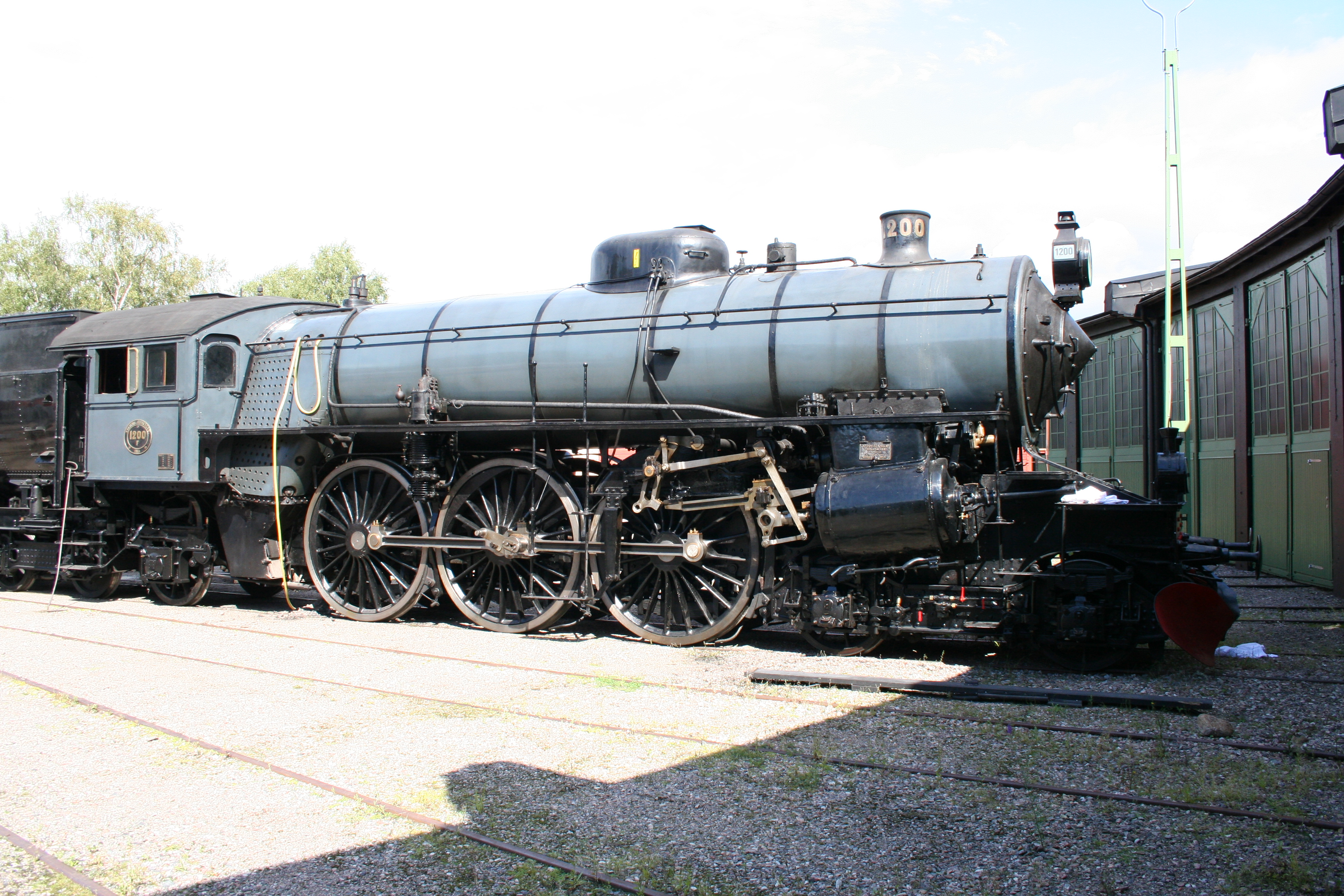 Dampflokomotive F 1200 Gävle 13.08.08